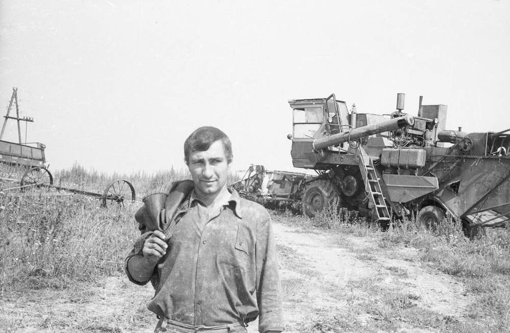 Механизатор колхоза «Красная заря» комсомолец Владимир В. Курицын. В 1978 году на комбайне СК-5 Владимир намолотил 653 тонны зерна и был удостоен знака ЦК ВЛКСМ «Золотой колос». В 1979 году Владимир первым среди механизаторов района намолотил 100 тонн зерна, поэтому горком КПСС и исполком райсовета направили ему благодарственное письмо. Переславский район, село Филимоново. (Переславский музей-заповедник, отдел истории советского общества, конверт 1024. По газетному списку номер 8.)